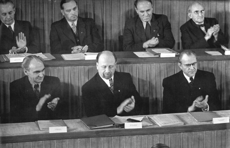 Illus/Quaschinsky 1.11.51 13. und 14. Sitzung der Volkskammer. Die Volkskammer der DDR trat am 31.10.51 und 1.11.51 zu ihrer 13. und 14. Sitzung zusammen, um u.a. über das "Gesetz über den Fünfjahresplan zur Entwicklung der Volkswirtschaft der Deutschen Demokratischen Republik", den "Rechenschaftsbericht der Regierung über die Einnahmen der Republik und ihre Verwendung für das Rechnungsjahr 1950" und das "Gesetz über die Deutsche Notenbank" zu beraten. UBz:[v.r.n.l.] Ministerpräsident Grotewohl, Stellv. Ministerpräsident Ulbricht und Stellv. Ministerpräsident Rau nach der Ansprache des Stellv. Ministerpräsidenten Ulbricht.